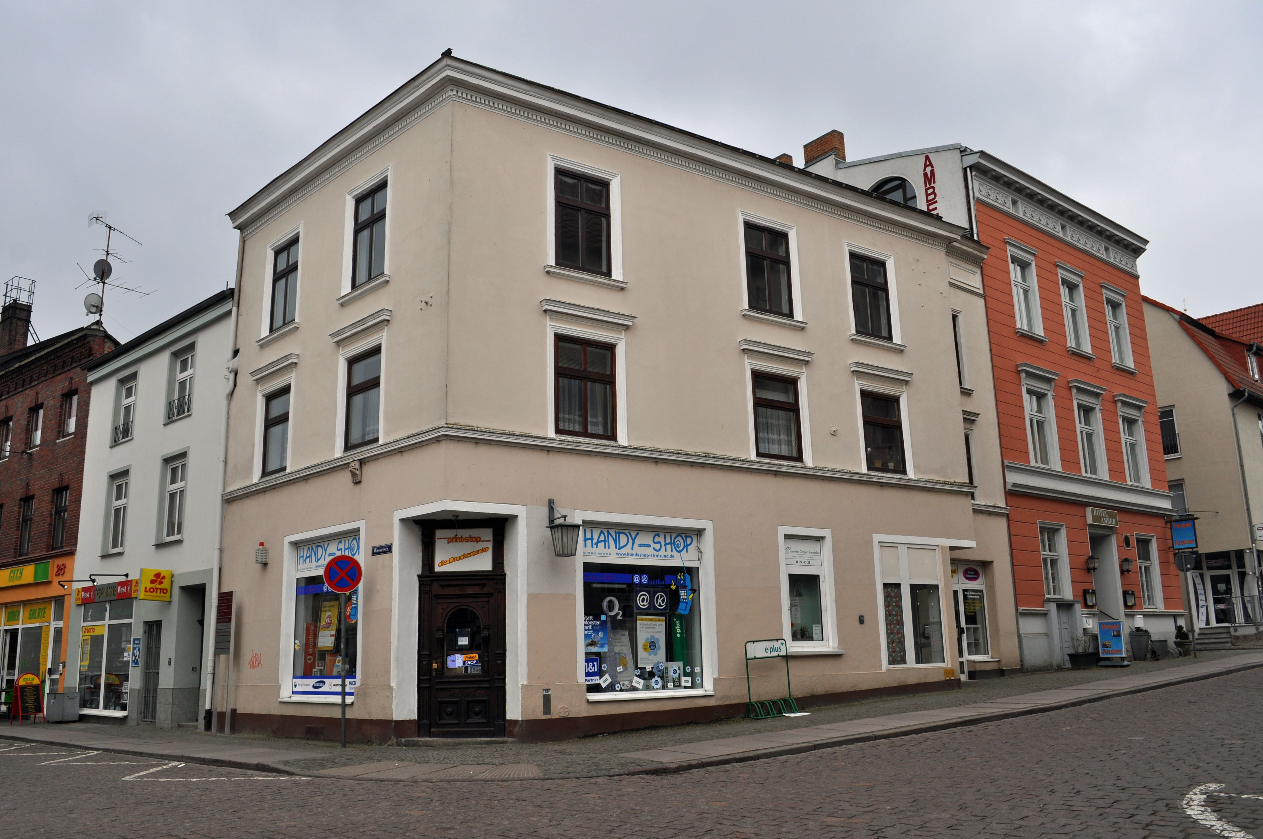 Gebäude bzw. Gebäudedetail in Stralsund. Straße und Hausnummer siehe Dateiname.